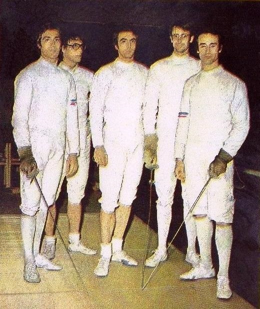 L'équipe de France de fleuret olympique en 1972 (Talvard, Flament, Noël, Pietruszka et Revenu), 'Munchen 72', Panini figurina n°38.